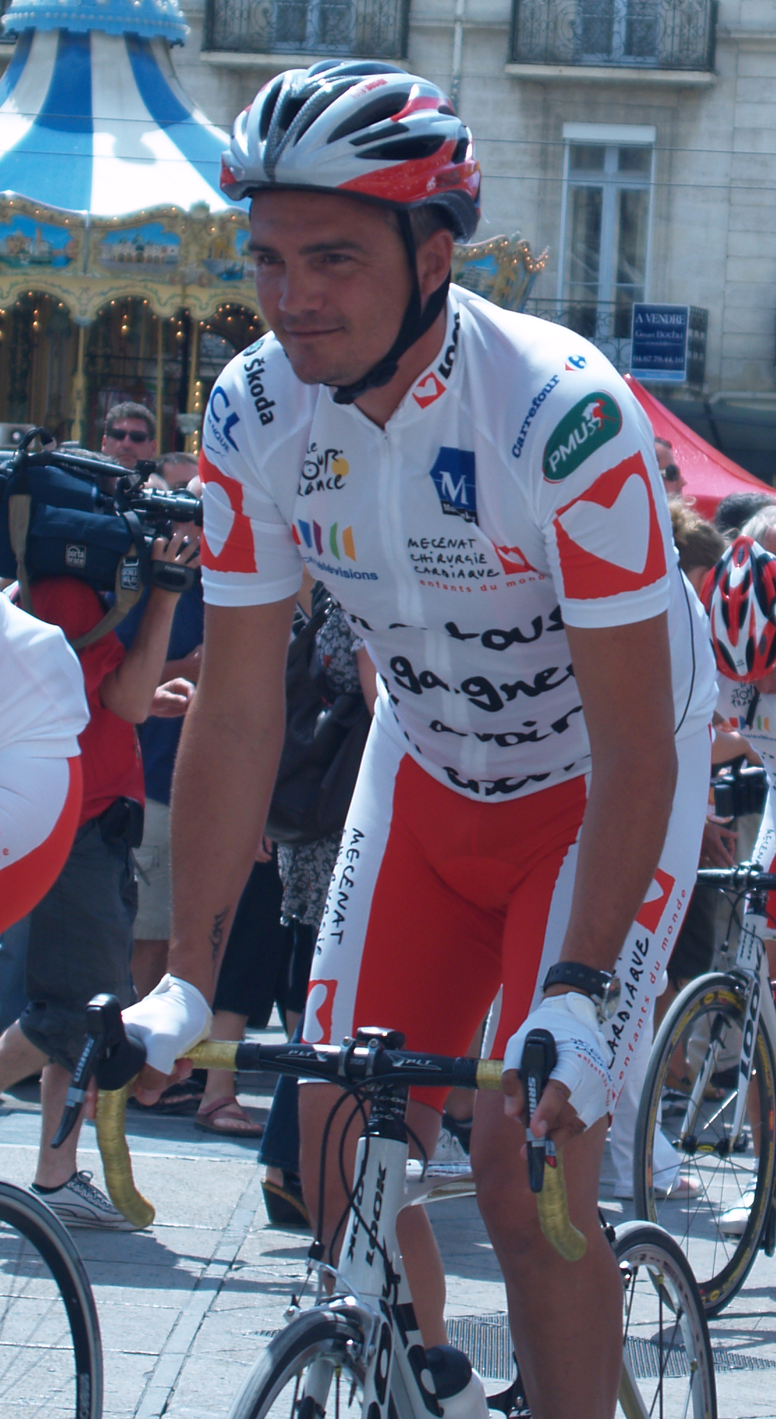 Richard Virenque lors de l'opération "On a tous un coeur" place de la comédie à Montpellier durant le tour de France 2009.